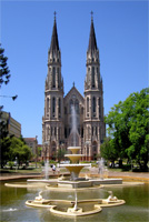 User Ricardo630 took this photograph Santa Cruz do Sul, Rio Grande do Sul, Brazil